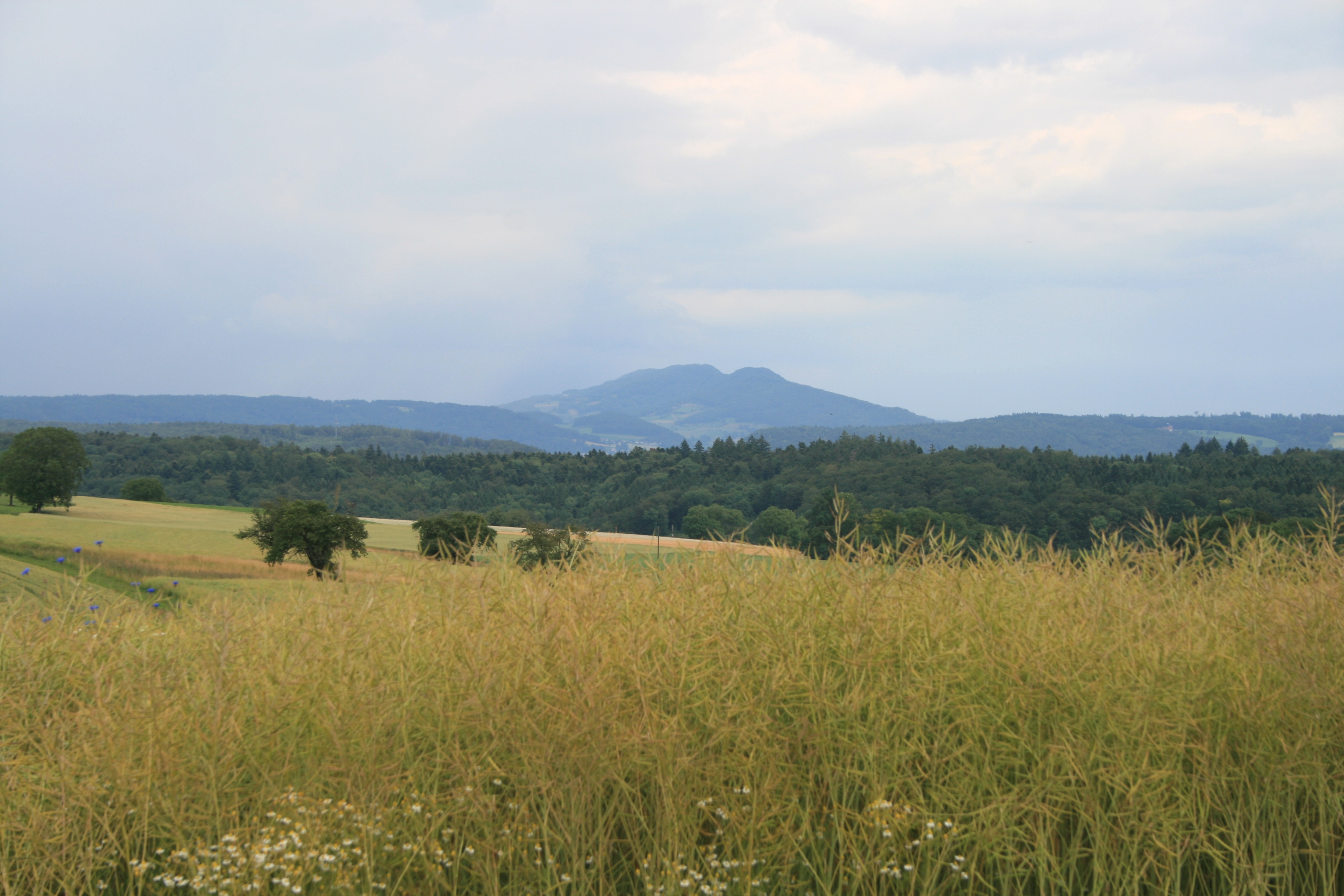 Blick vom Bözberg Richtung Lägern, Kanton Aargau, Schweiz